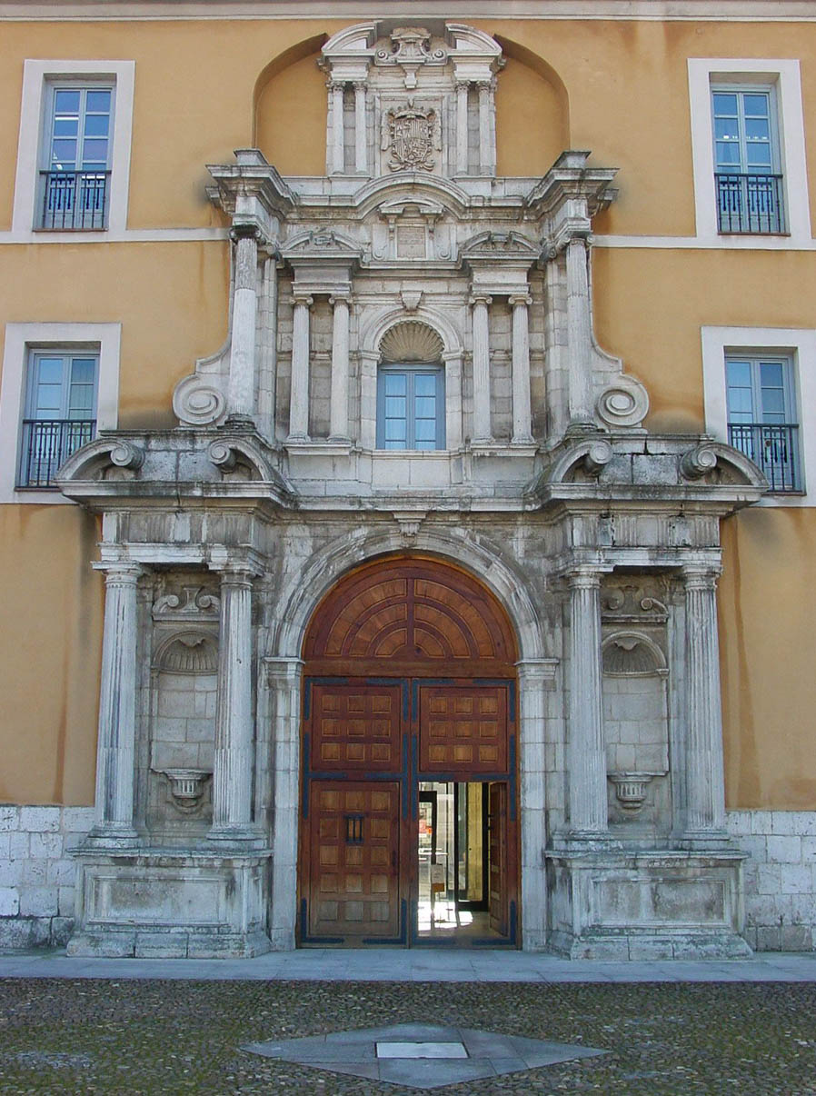 Valladolid, España. Monasterio jerónimo de Nuestra Señora del Prado, edificio del siglo XVII. Portada barroca de la iglesia.